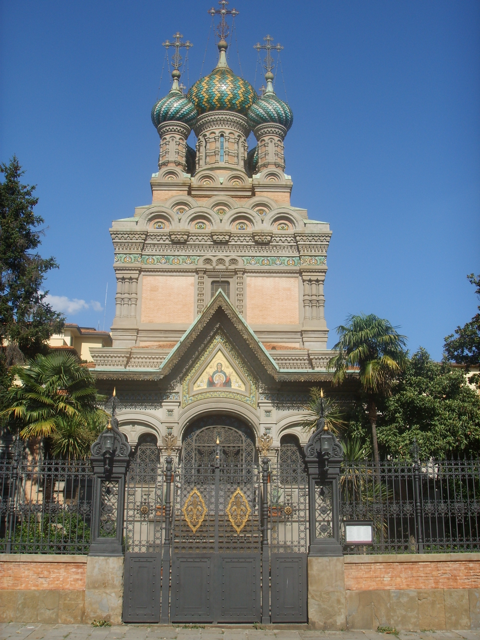 Chiesa russa ortodossa 3